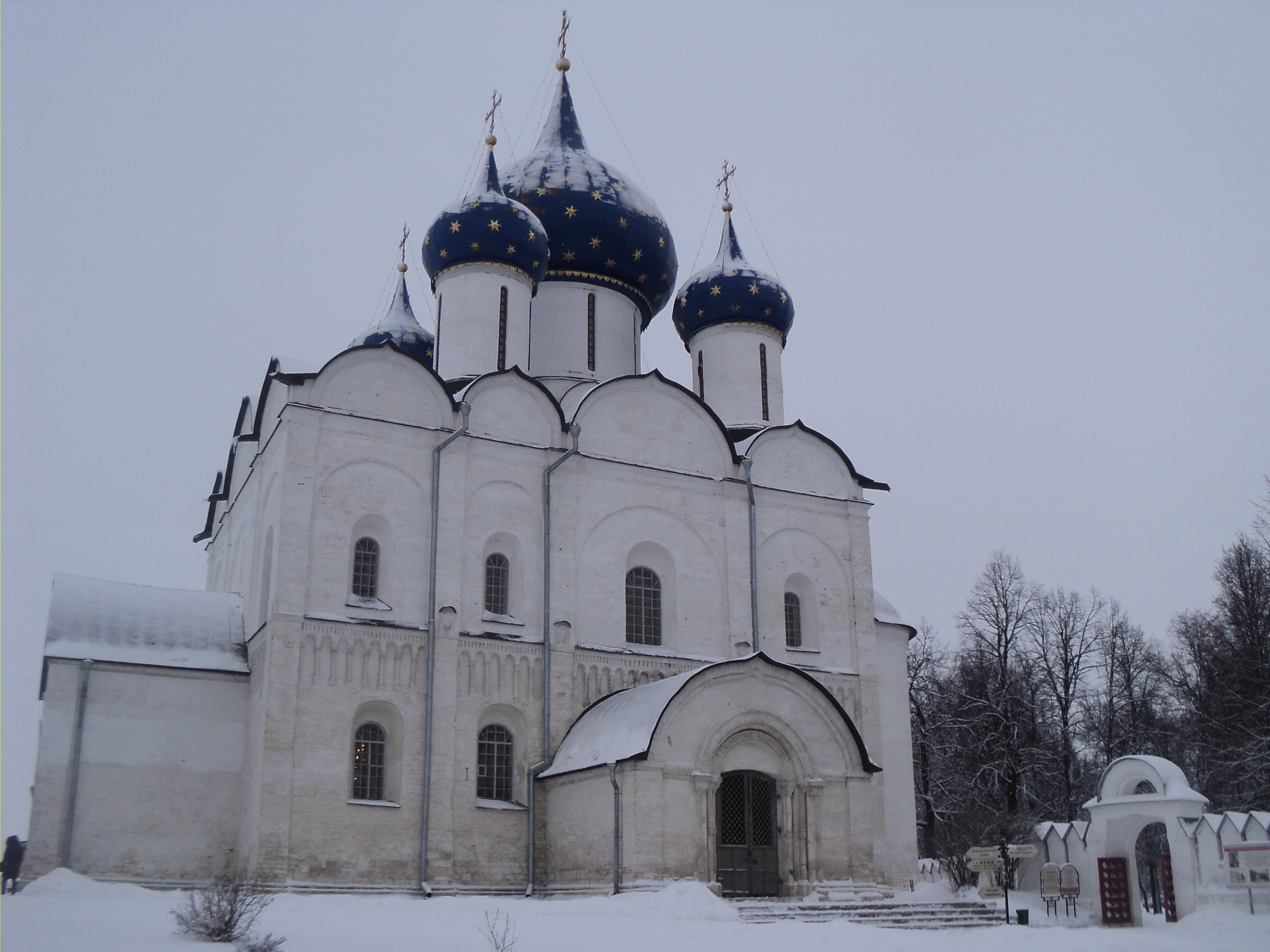 Собор Богородице-Рождественский (Владимирская область, Суздаль, улица Кремлевская, Лебедева)